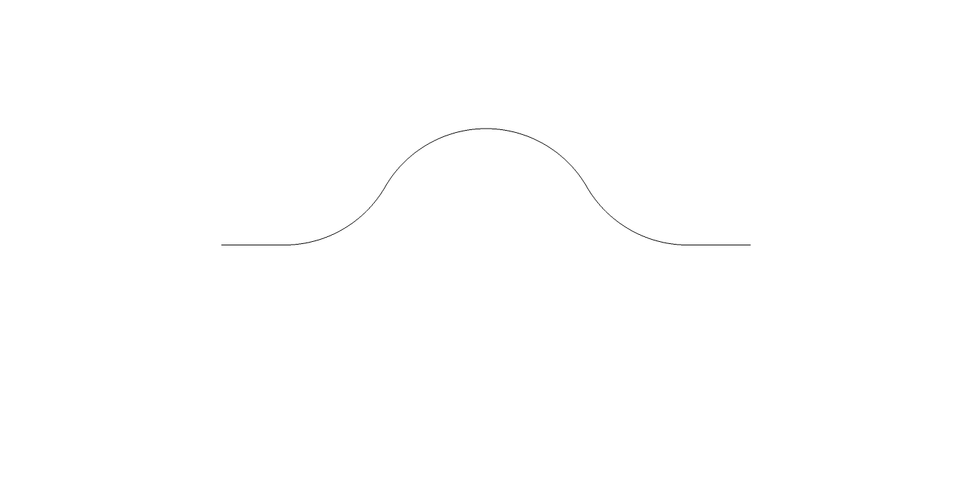 etape7